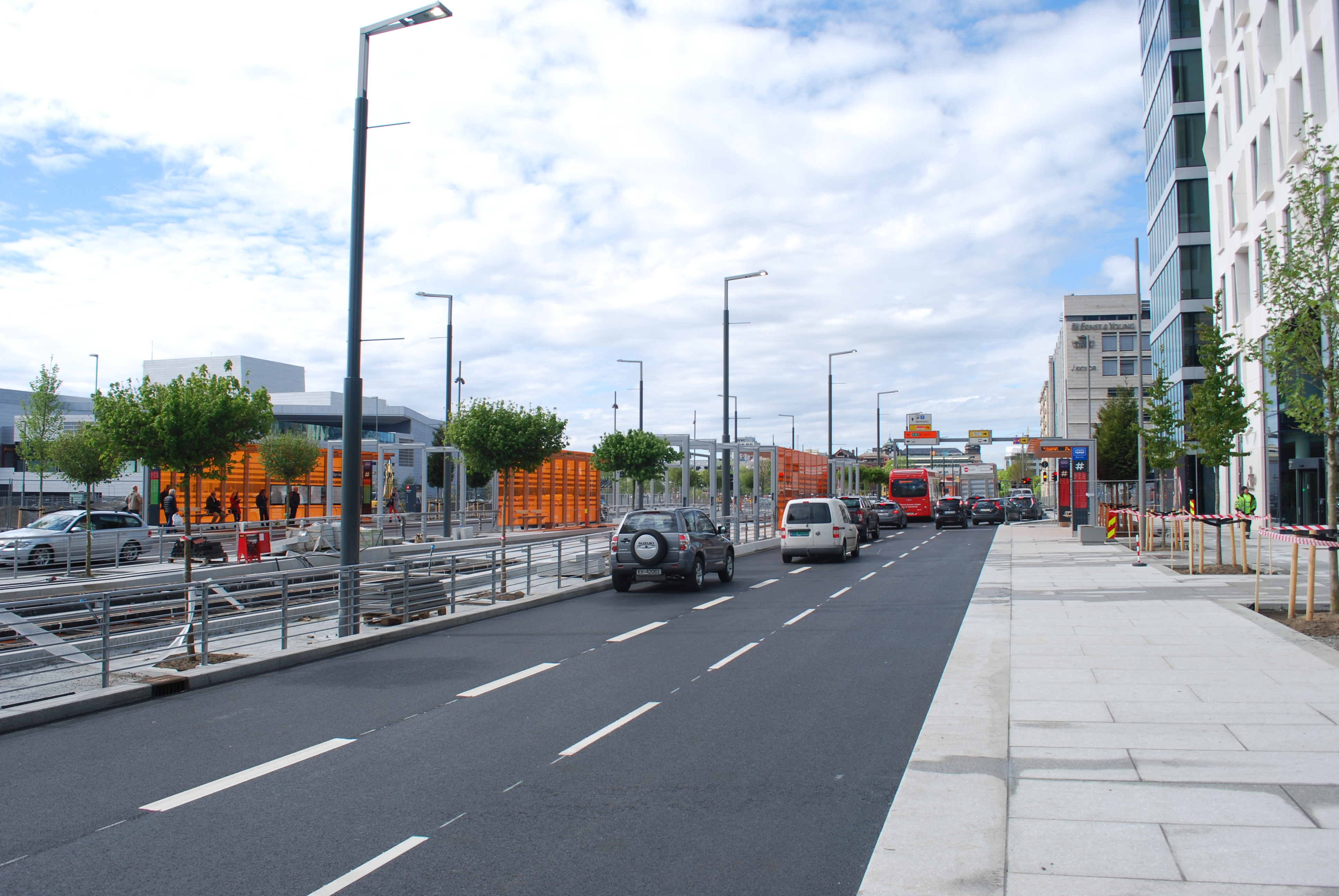 Dronning Eufemias gate, mai 2014 noen dager etter åpning, med Bjørvika holdeplass for buss og trikk. Operaen til venstre.